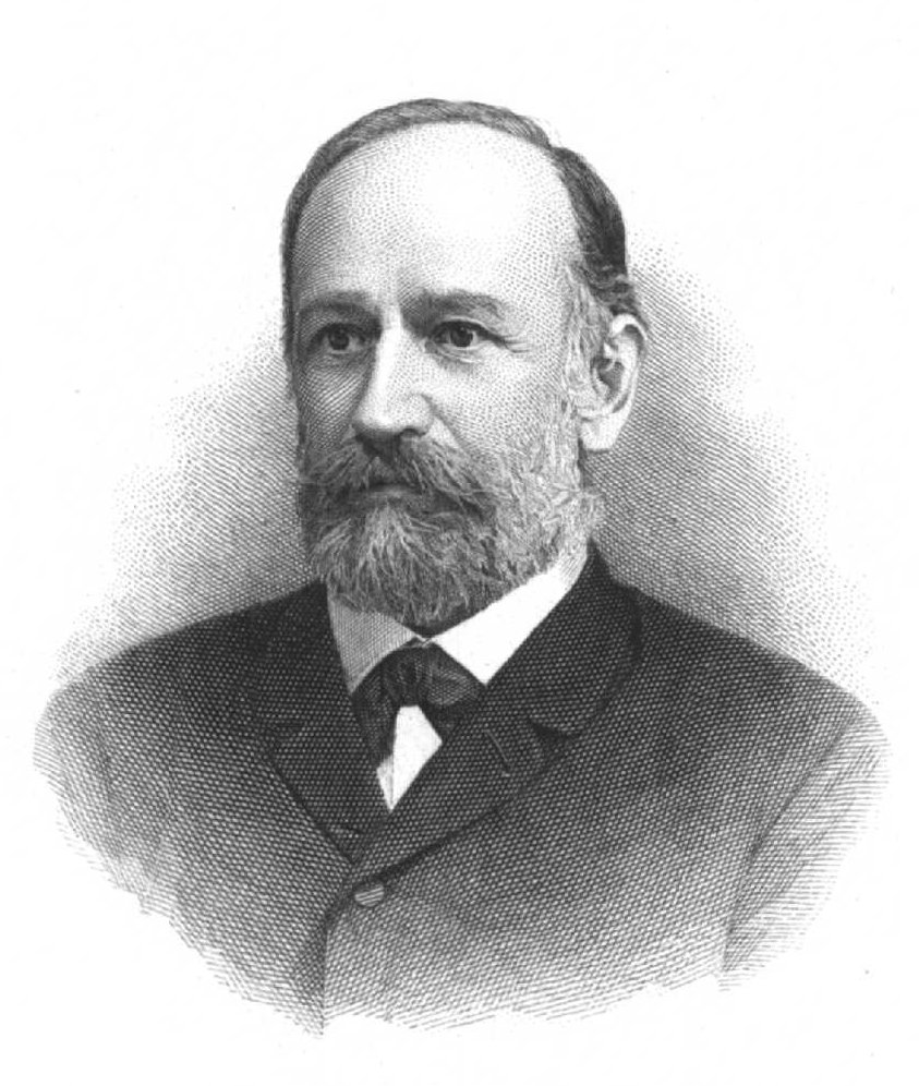 Jožef Stefan (1835-1893), Slovene physicist.